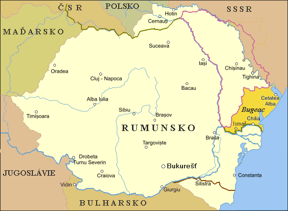 Budžak v rámci meziválečného Rumunska.